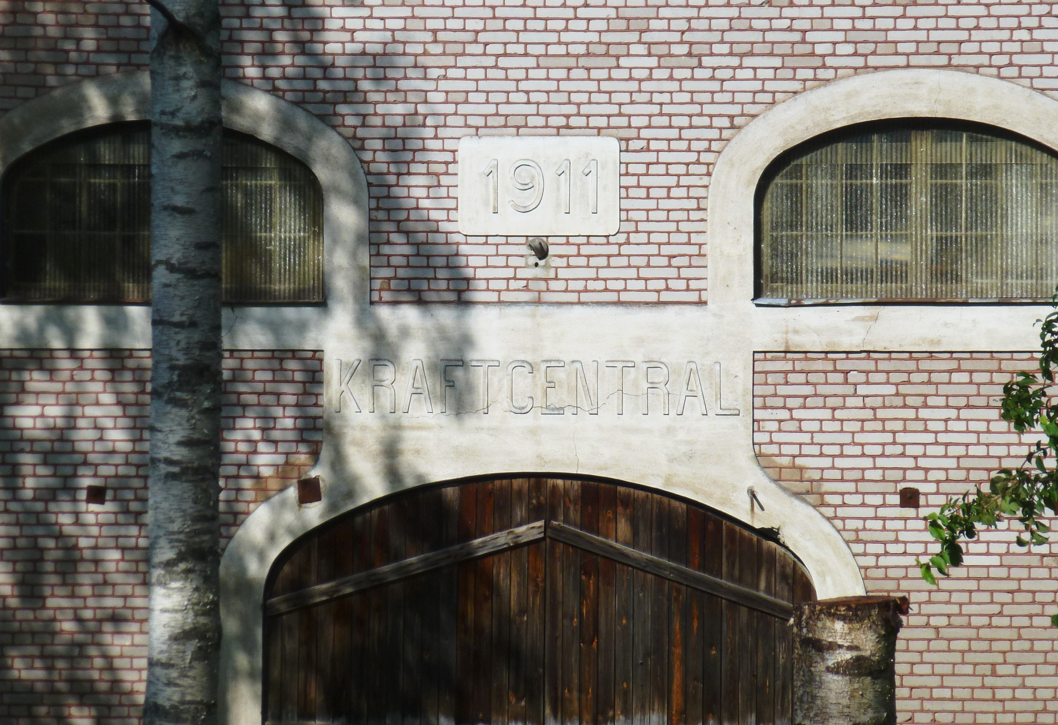 Lekomberg Kraftcentrals gamla byggnad vid Väsman